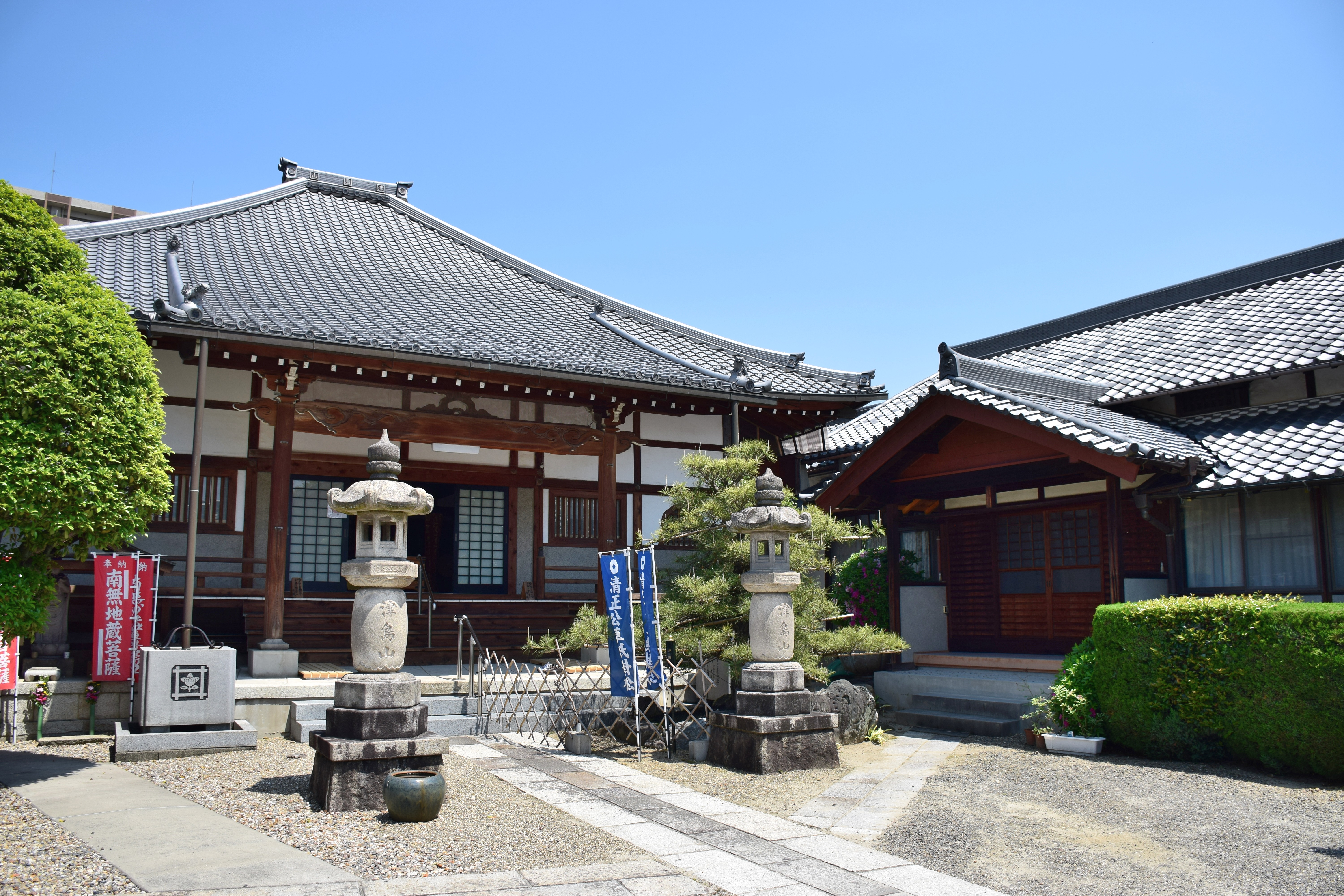 加藤清正ゆかりの妙延寺